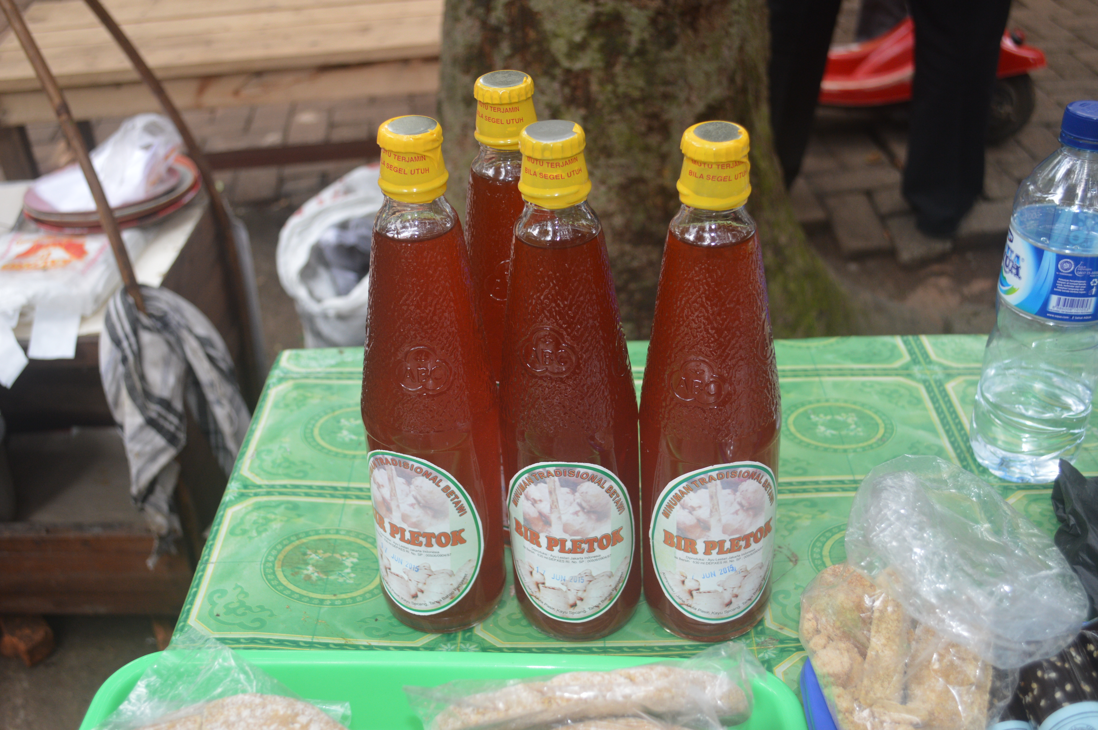 Bir pletok, minuman tradisional khas masyarakat Betawi di Jakarta.